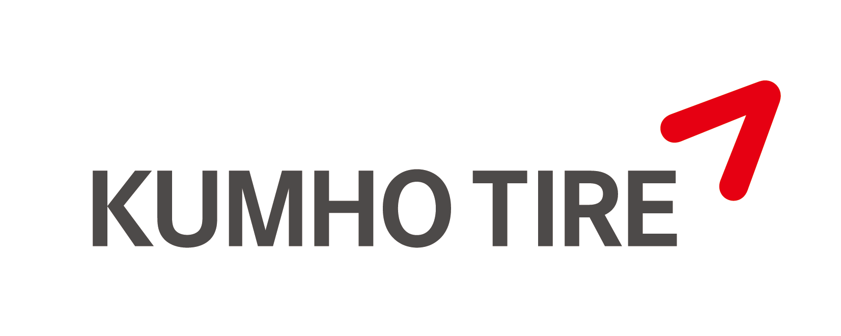 クムホタイヤ